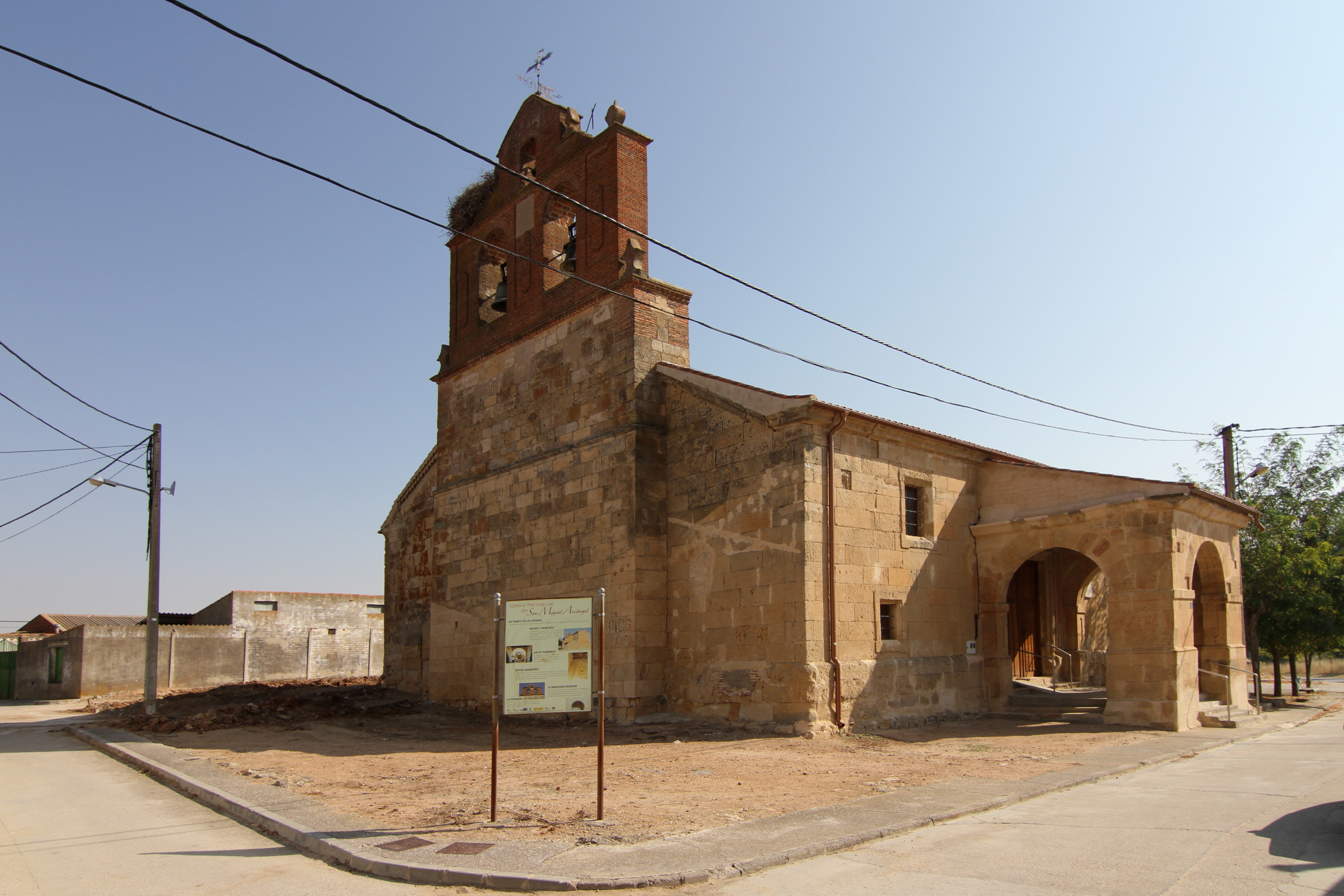 Iglesia de San Miguel Arcángel, Pitiegua